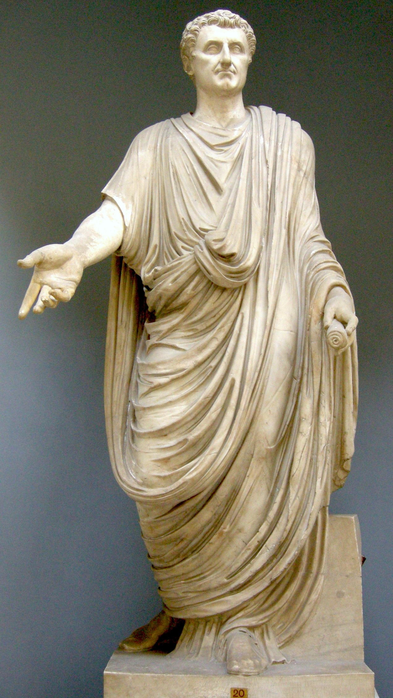 Togato, I sec dc. con testa di restauro da un ritratto di nerva, inv. 2286. Museo Chiaramonti.